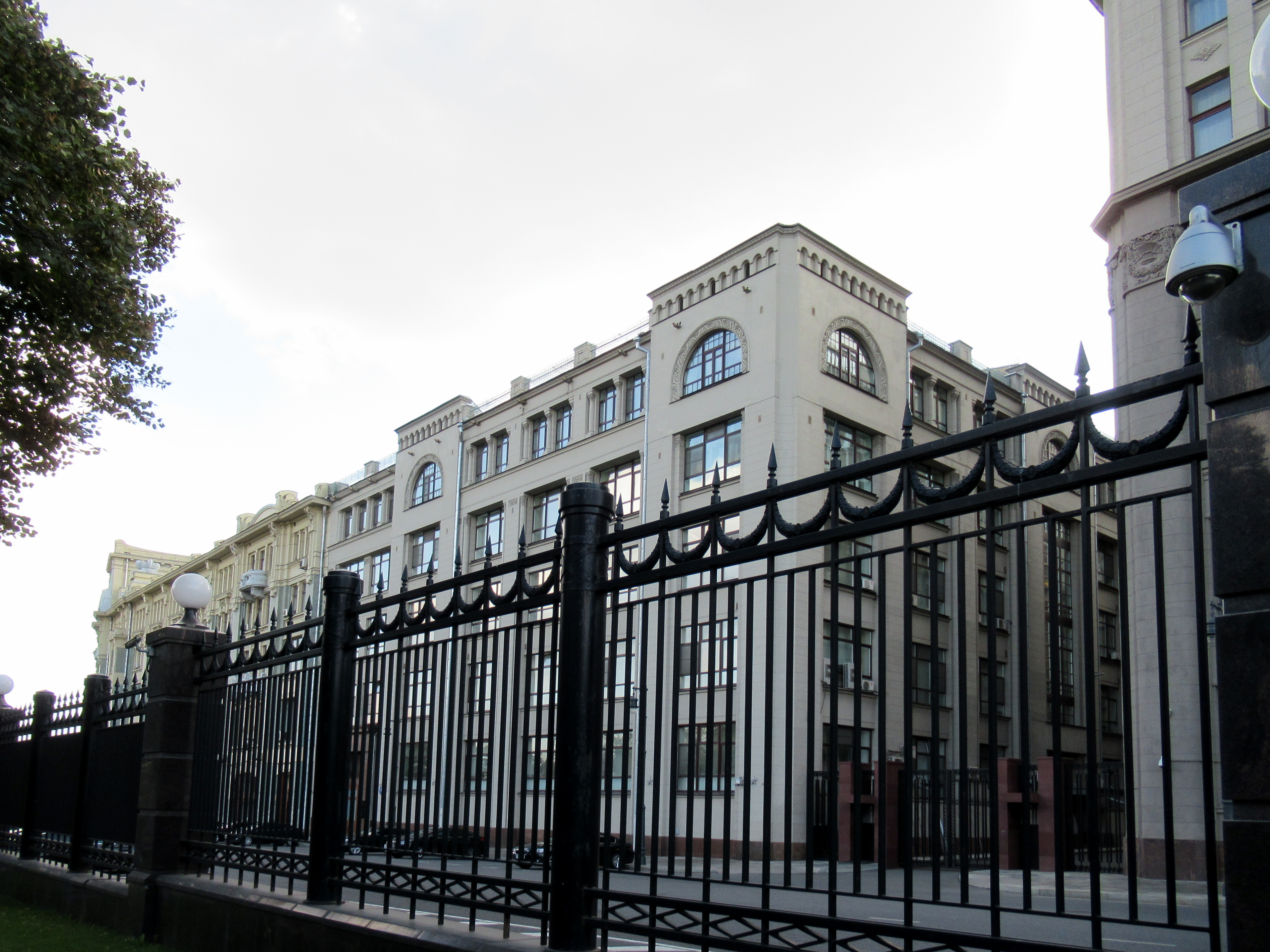 Торговый дом Е. А. и Э. Арманд: Старая пл., 6, Тверской, Центральный округ, Москва